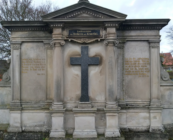 Familiengrab von Grunelius